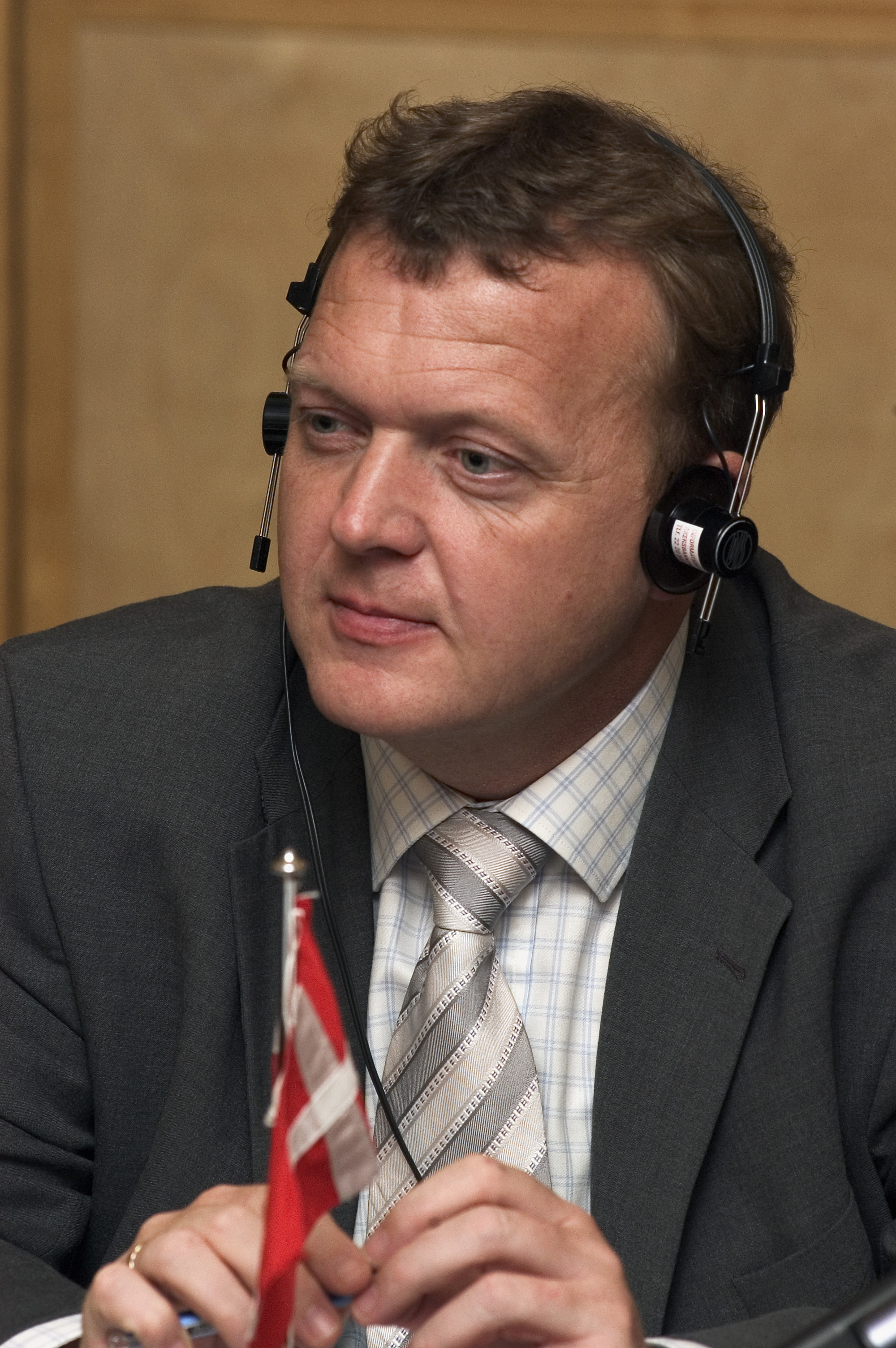 Ekstraordinært møde om alkoholpolitik 18. oktober. Lars Løkke Rasmussen